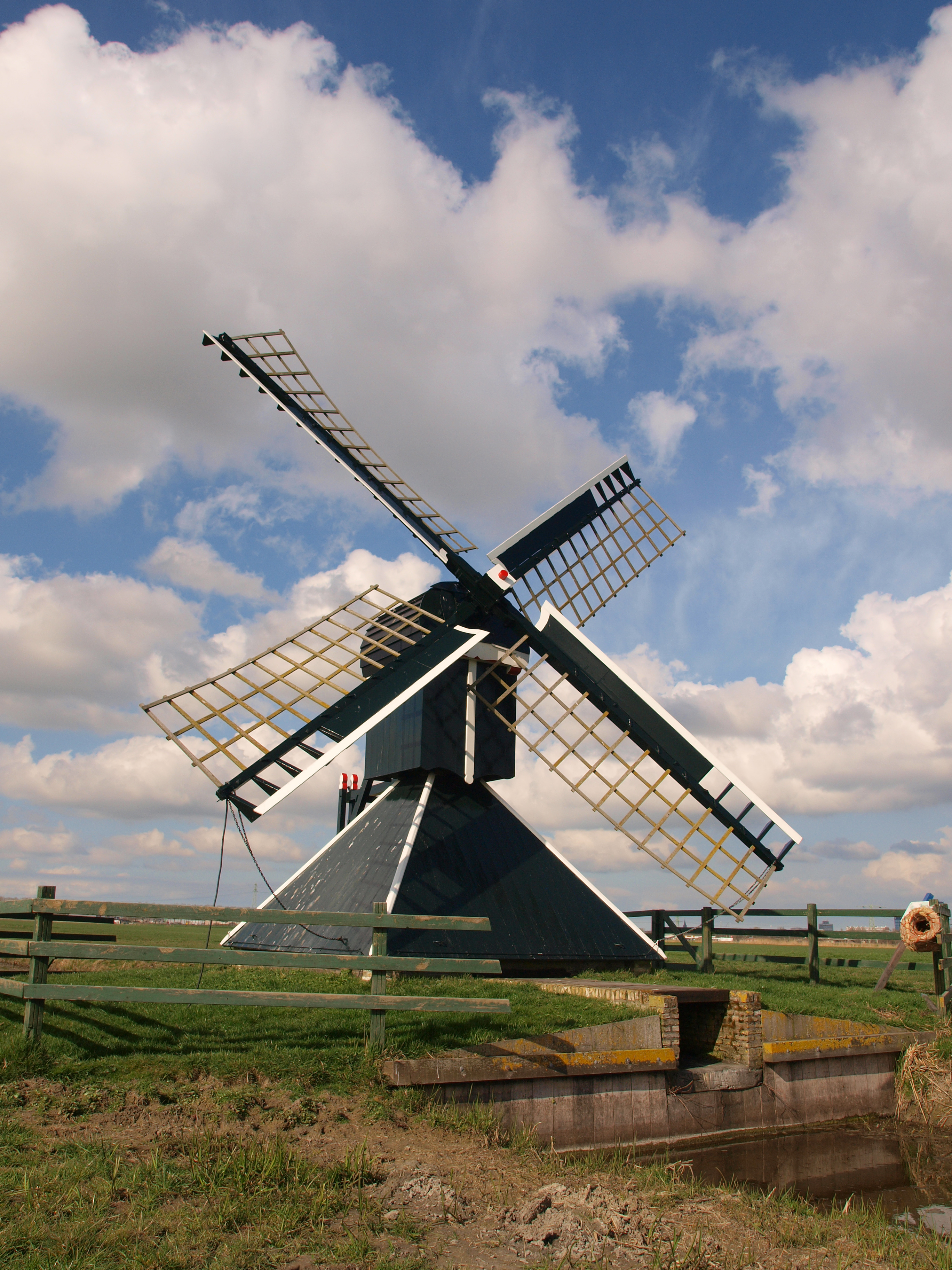 Molen Hoogland